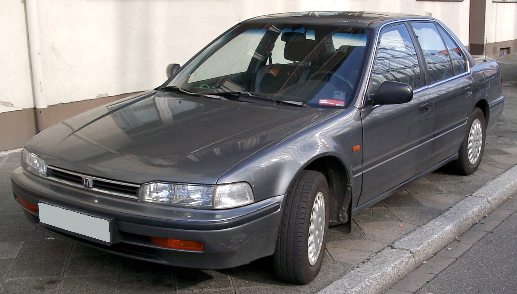 Honda Accord, 4. Generation